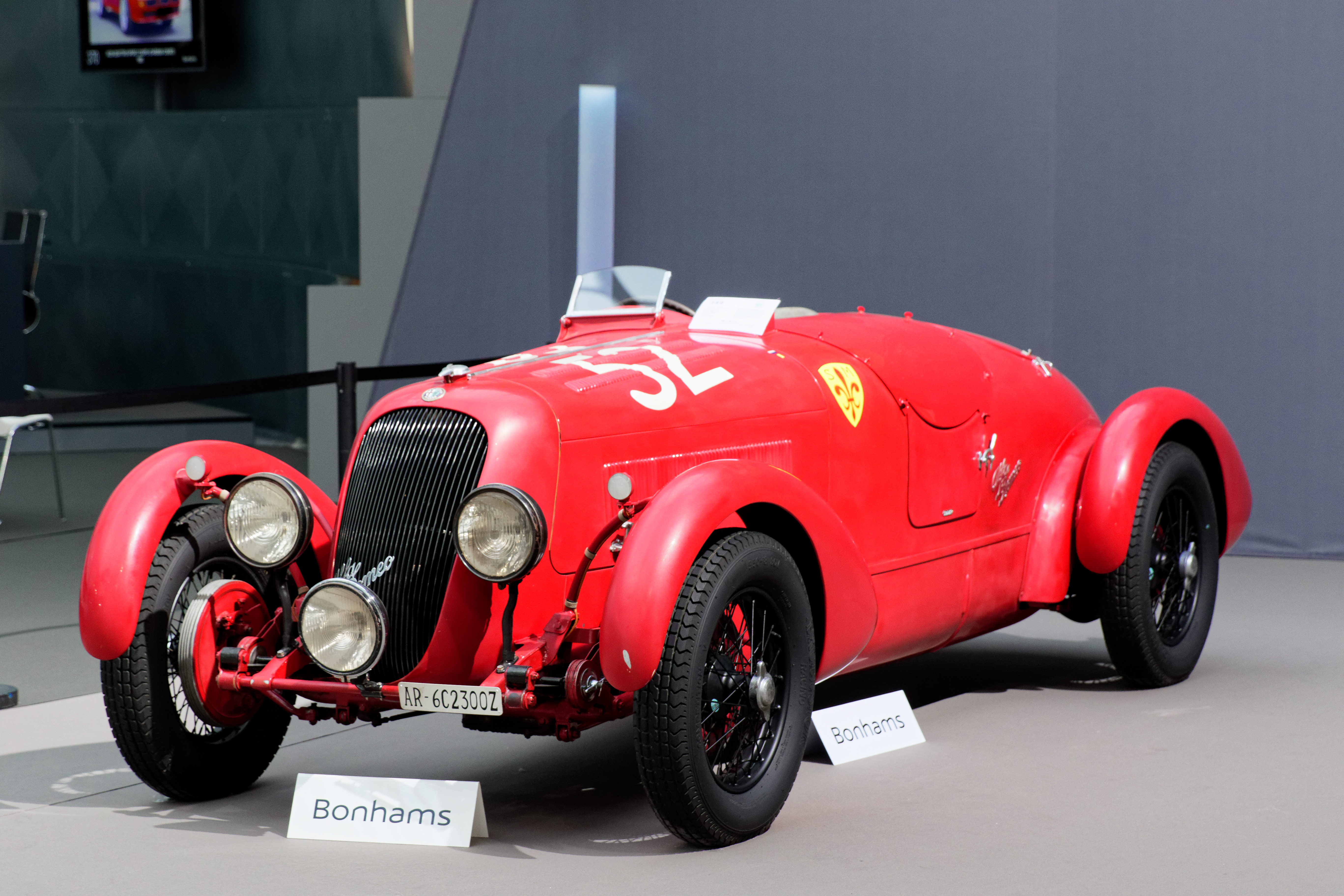 Un des véhicules présenté lors de la vente aux enchères Bonhams 2017 au Grand Palais de Paris.